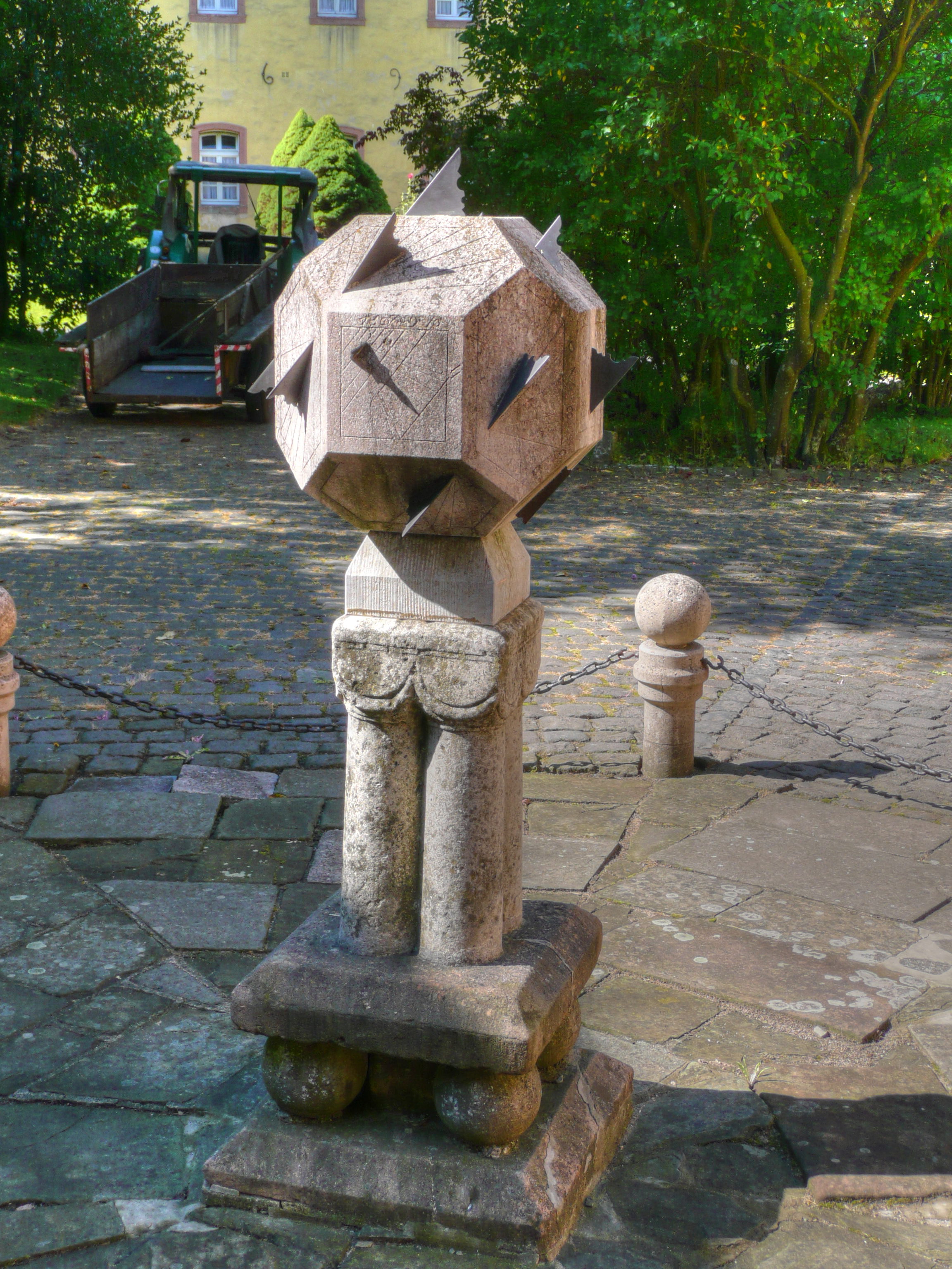 Vielflächen-Sonnenuhr (17 verschiedene Sonnenuhren) vor dem Steinfelder Klosterhauptgebäude; oben: Horizontal-Sonnenuhr; links: Süd-Uhr; dann: Süd-Ost-Uhr; vorn: (polare) Ost-Uhr; dann: Nord-Ost-Uhr; rechts: Nord-Uhr